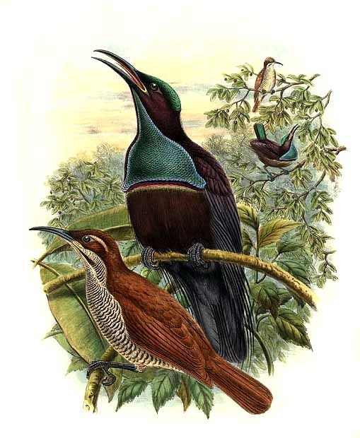 Ptiloris magnificus